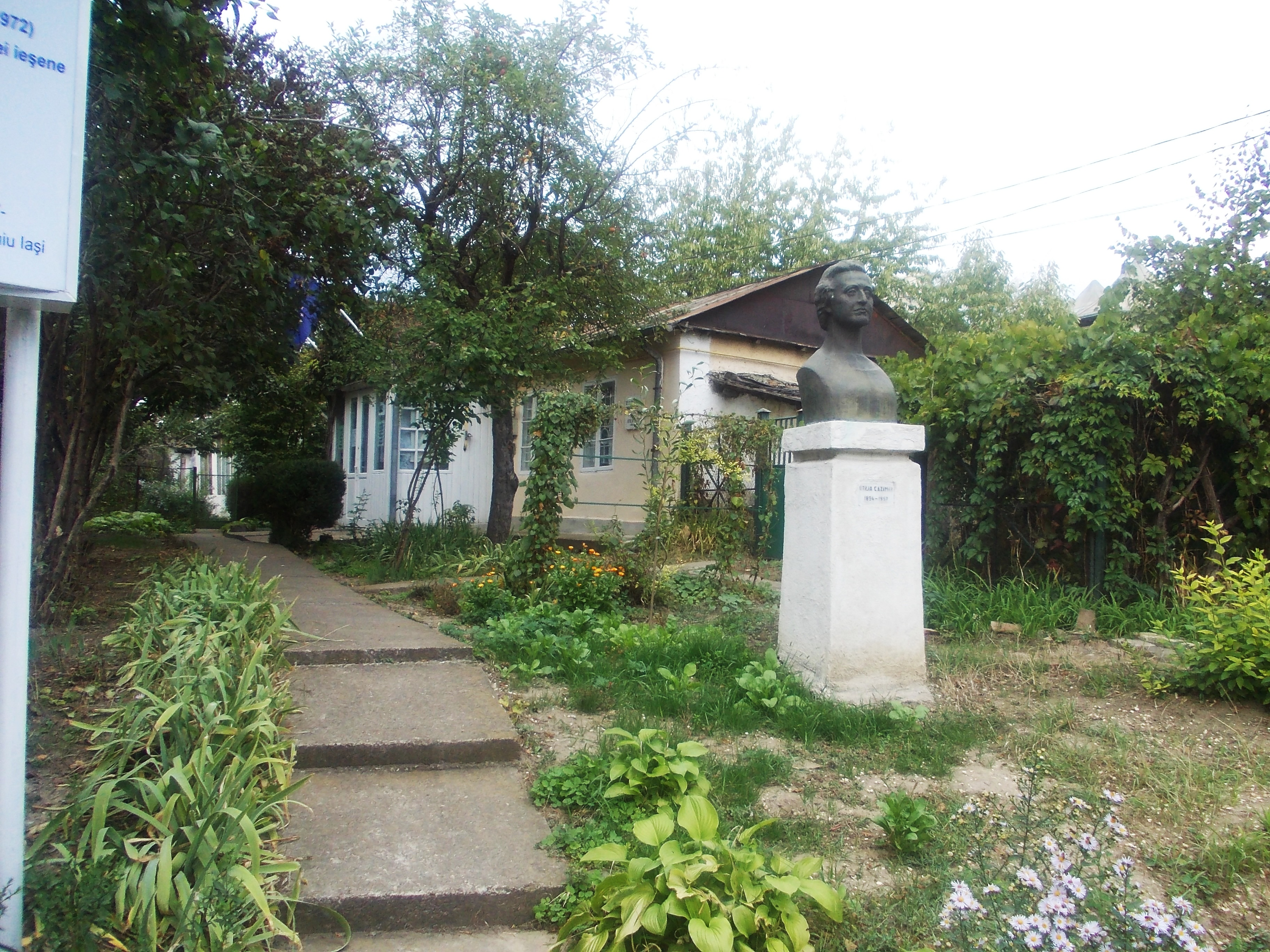 municipiul Iași, Str. Cazimir Otilia 4